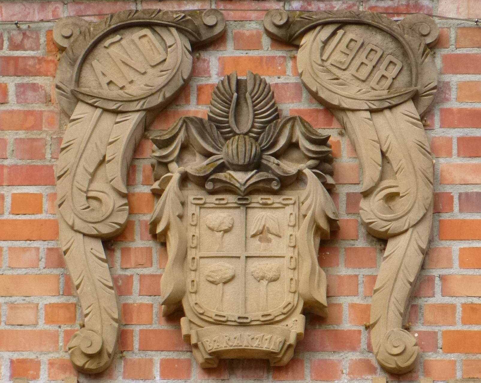 Ayuntamiento de Barañain (Navarra)